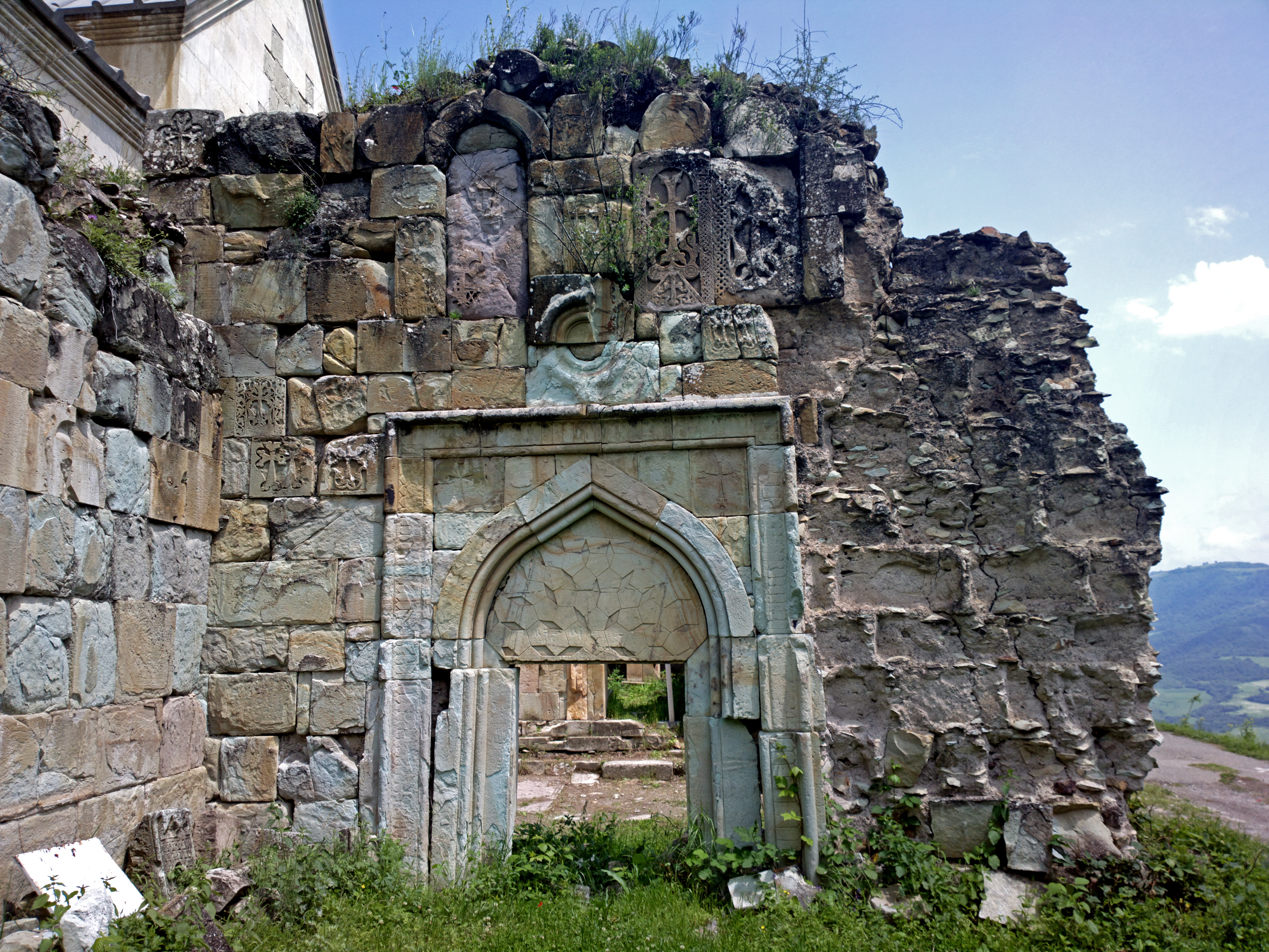 Վանական Համալիր Նոր Վարագավանք (Անապատ) 60/10